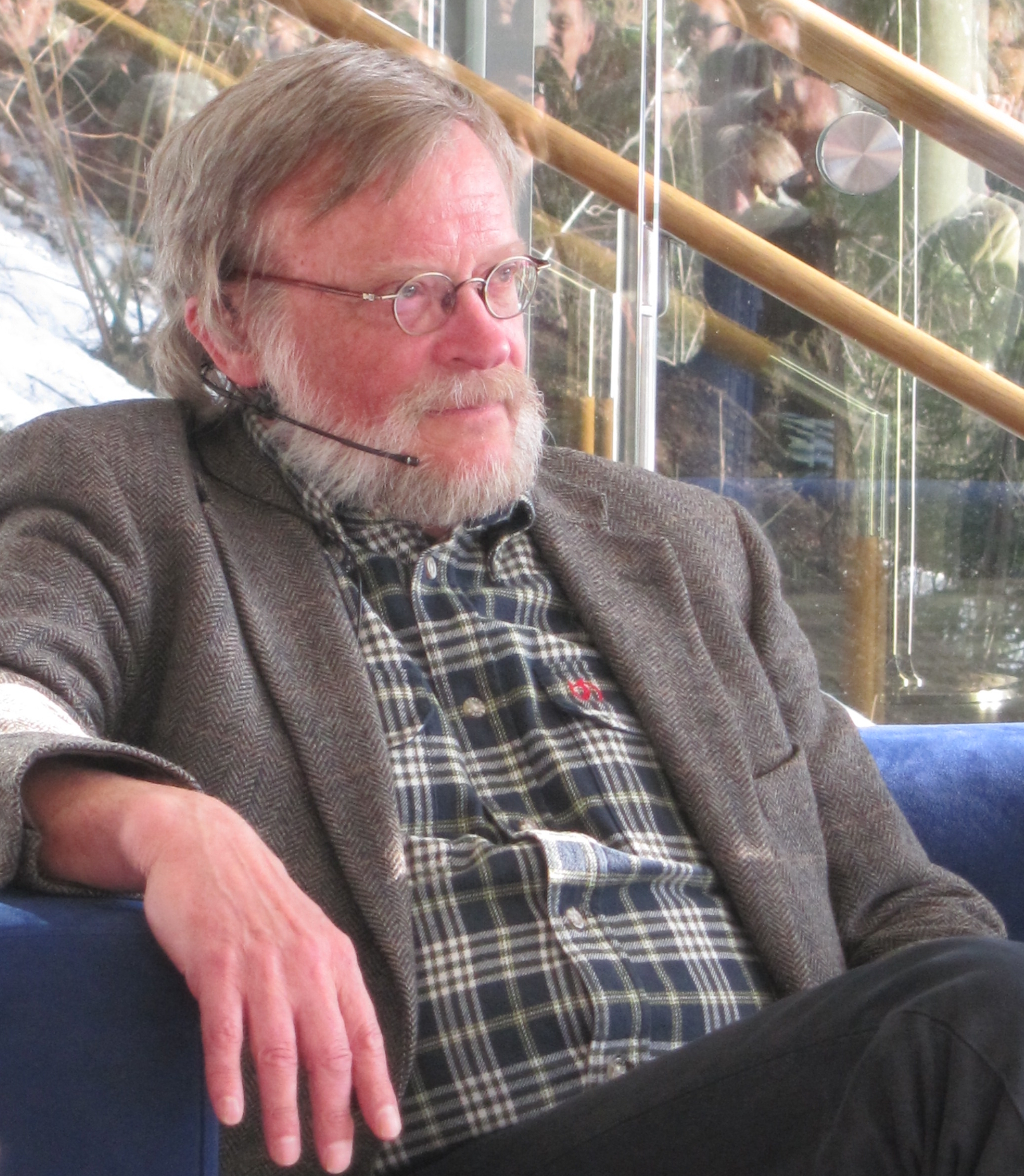 Norwegian professor of History, Tore Pryser, photo taken at the Norwegian National Archive